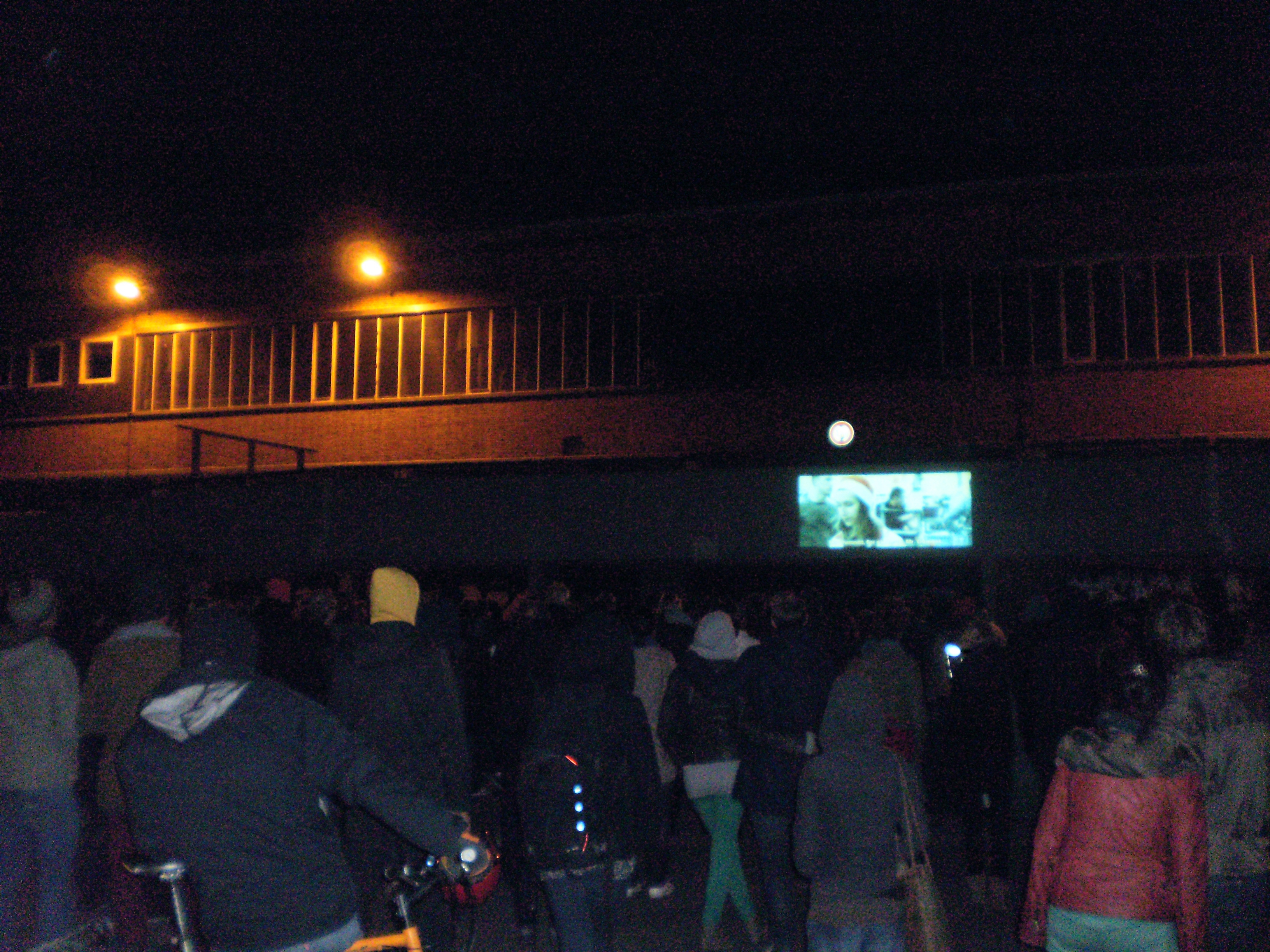 Projektion eines Kurzfilms an die Wand eines ehemaligen Supermarktgebäudes am Neuen Kamp. Veranstaltung von A Wall is a Screen im Rahmen des 28. Internationalen KurzFilmFestivals Hamburg.